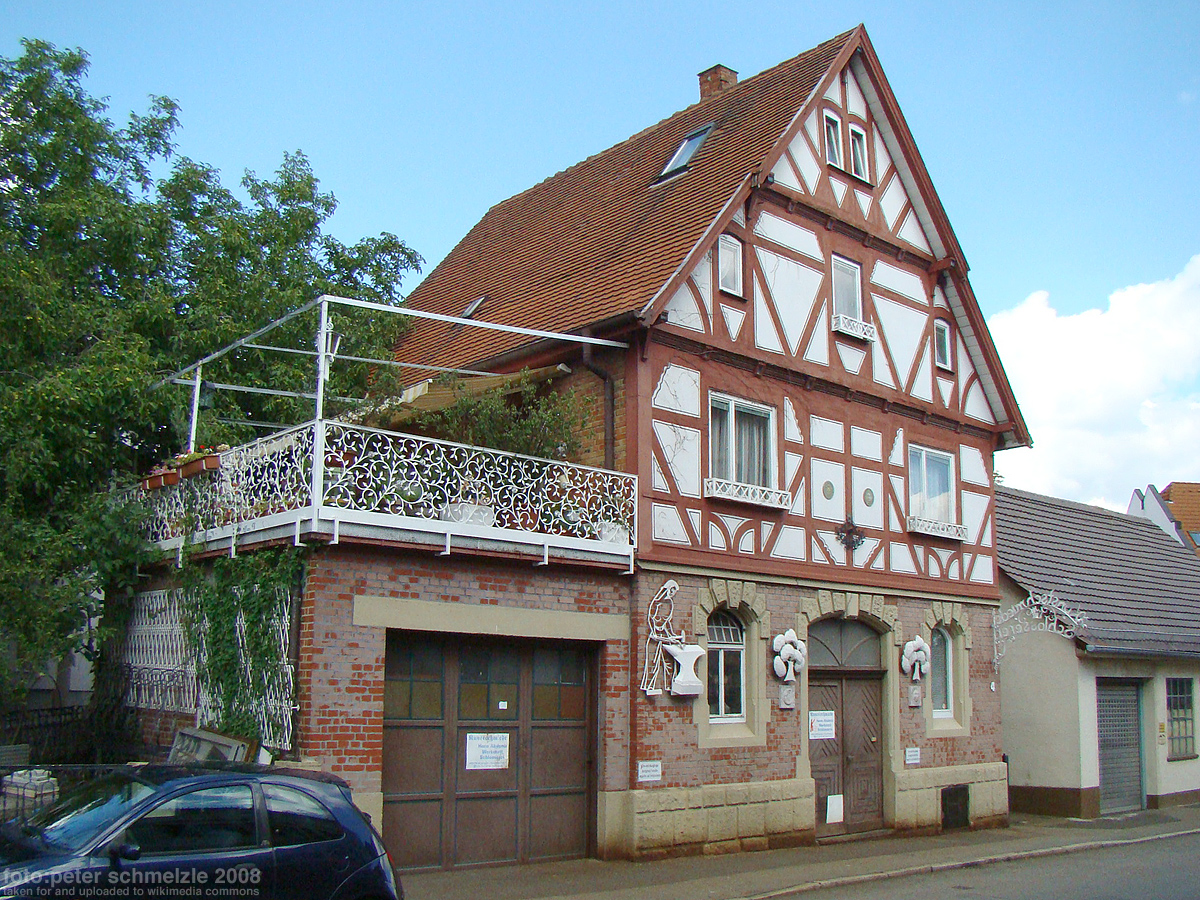 Denkmalgeschütztes Gebäude Heuchelbergstr. 4 in Heilbronn-Böckingen